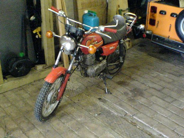 Honda XL 50